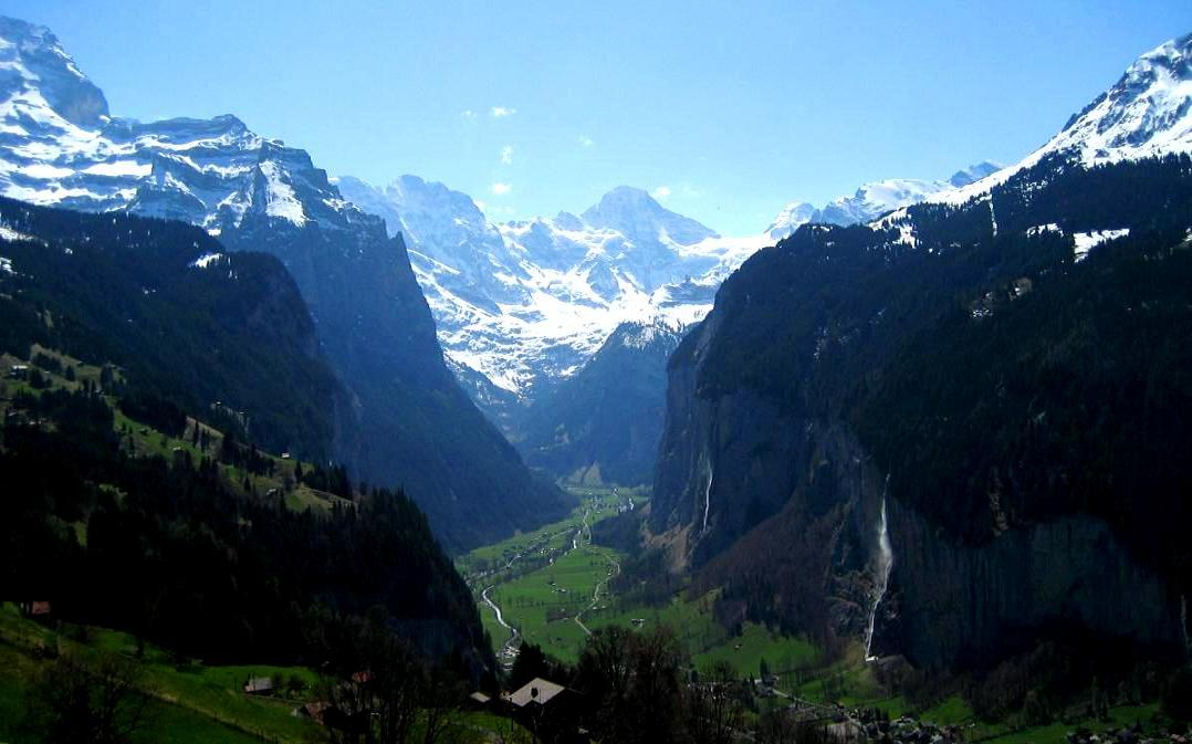 Lauterbrunnental from Wengen, Bernese Alps